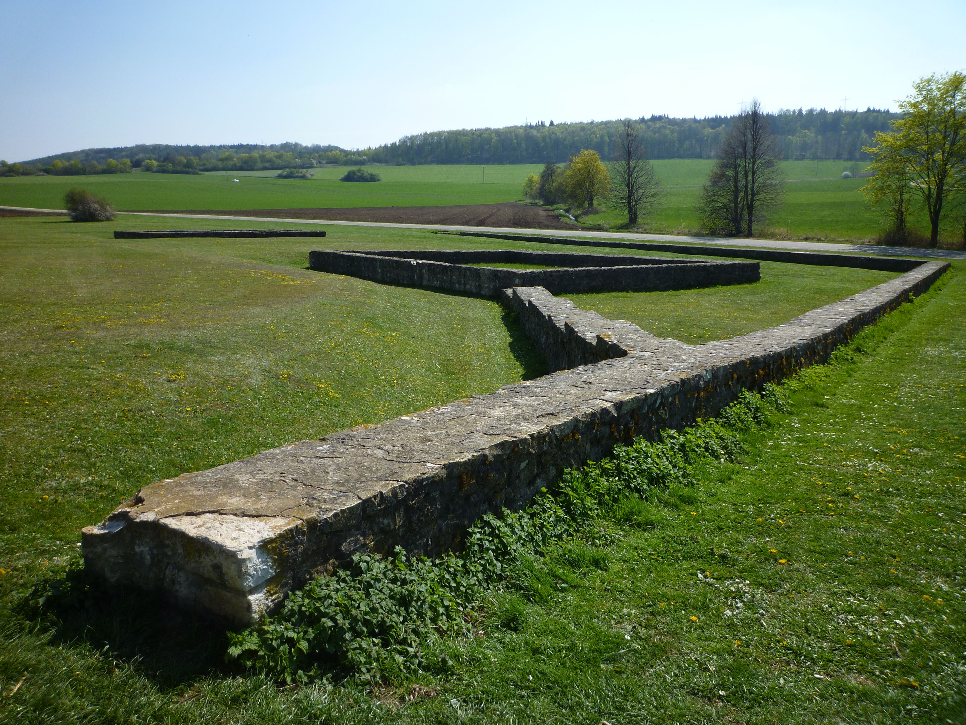 Nördlingen -Villa Rustica - Römischer Gutshof02